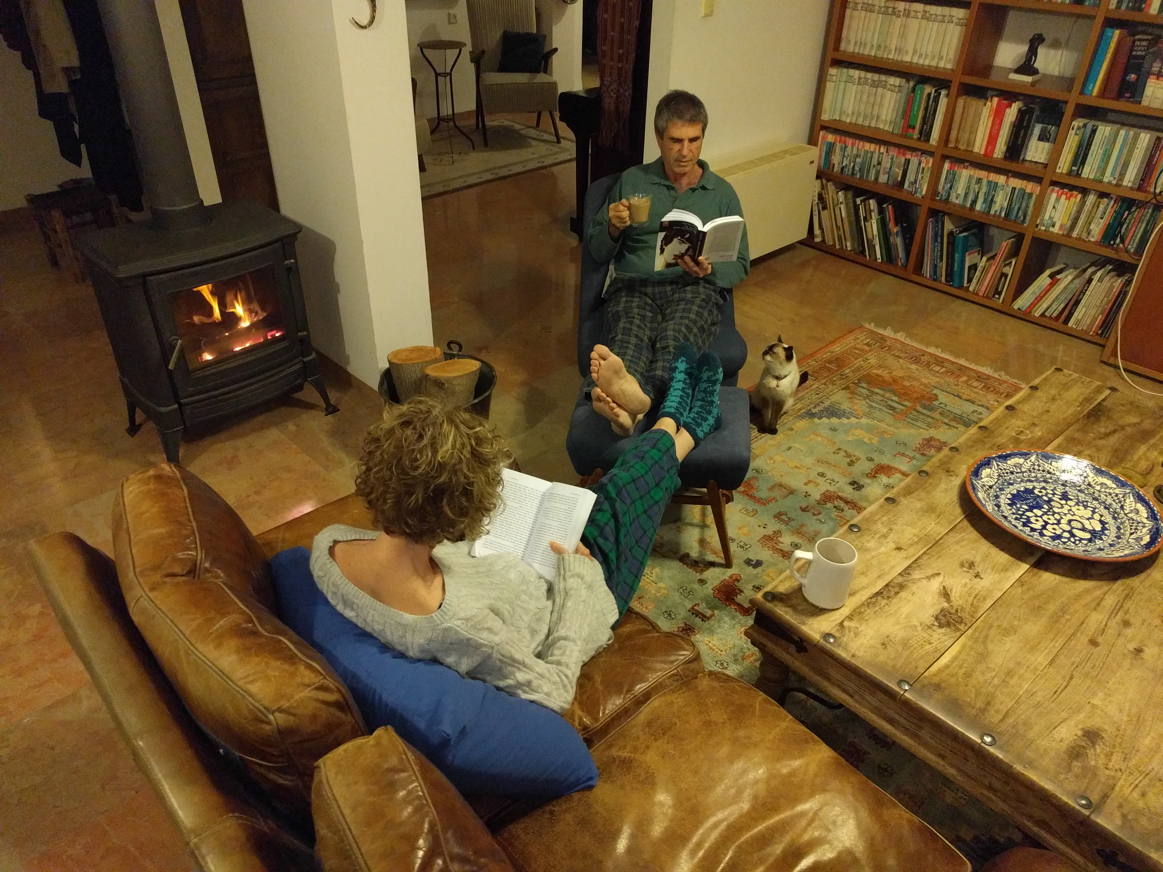 תמונה שצילמתי בביתי